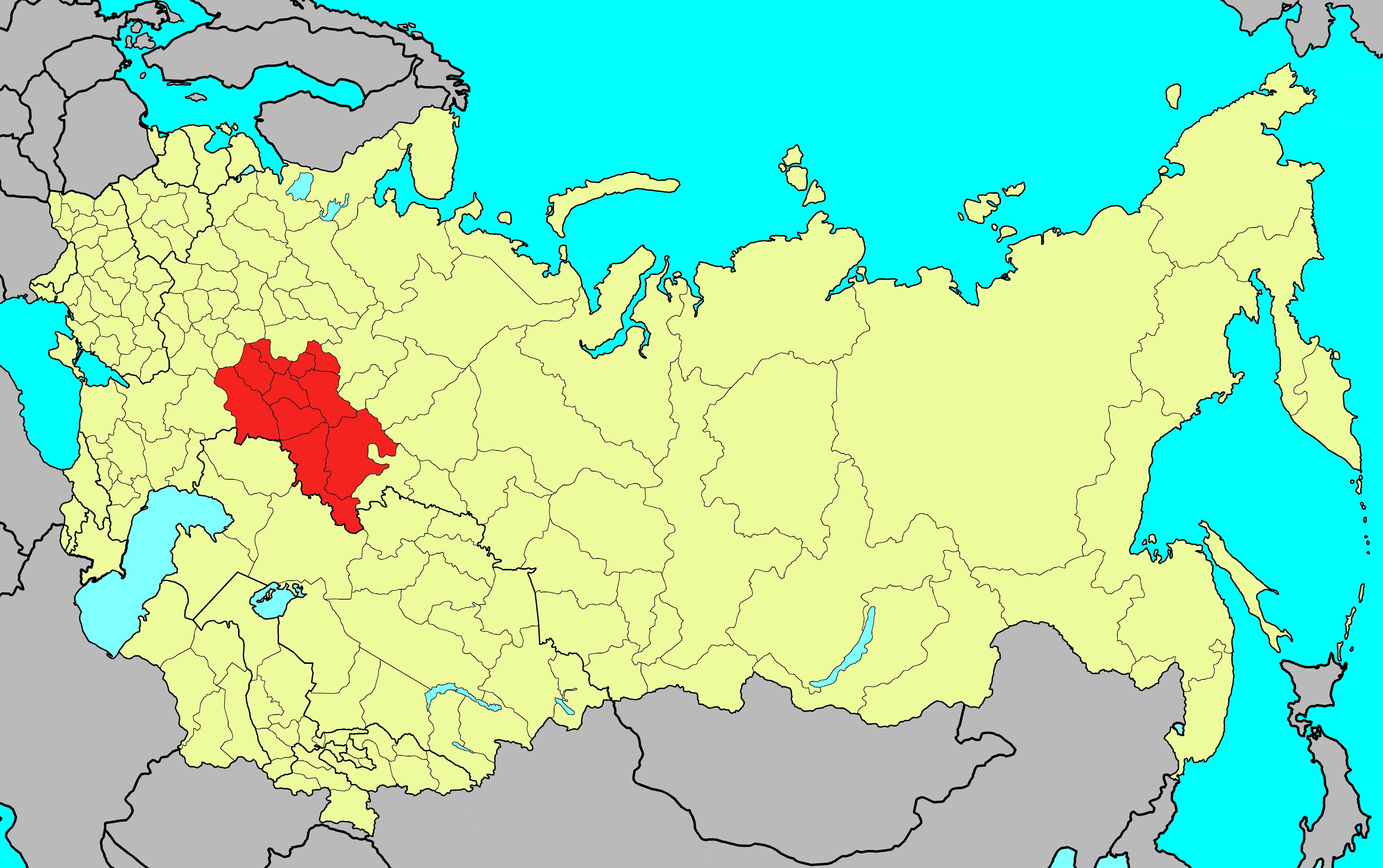 Приволжский военный округ ВС СССР на 1 января 1989 года